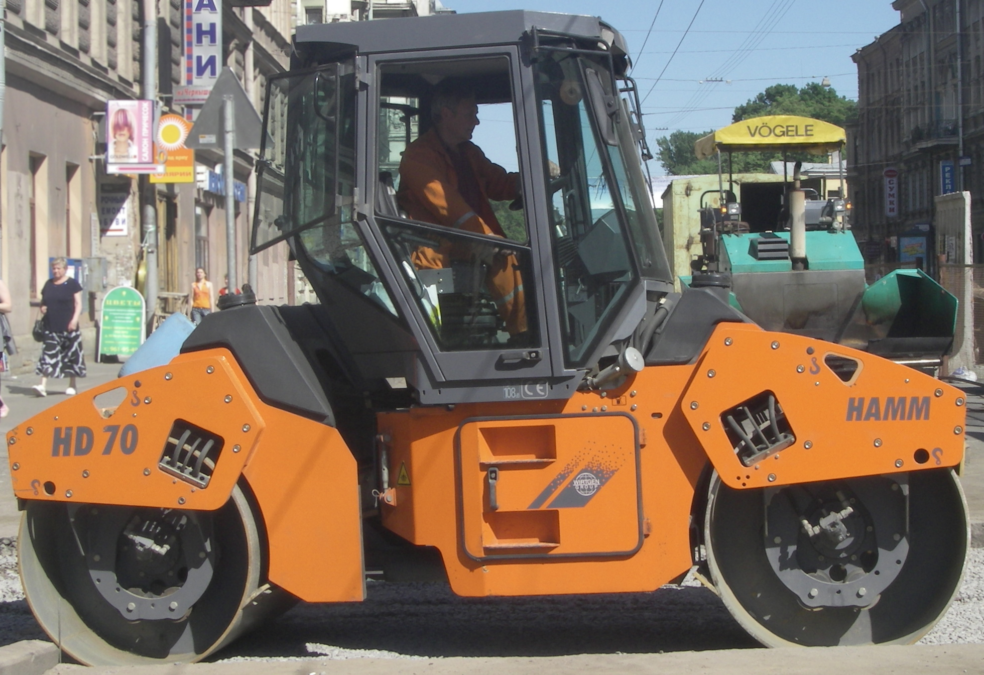 Каток